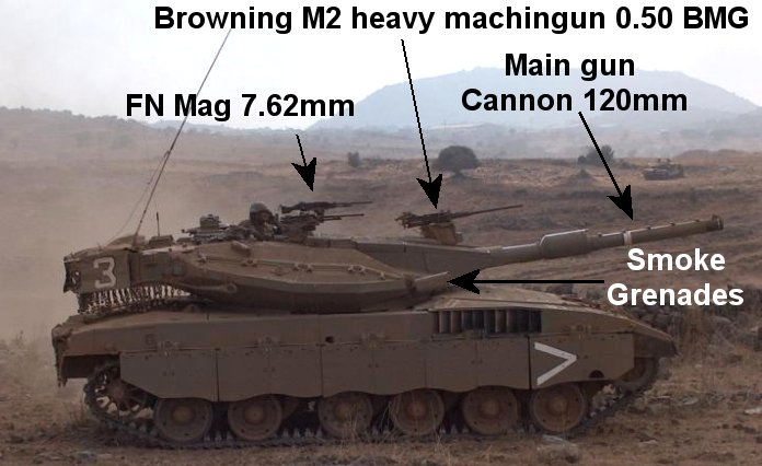 The weapons of Merkava MkIII Baz tank כלי הנשק של טנק מרכבה סימן 3 ב"ז